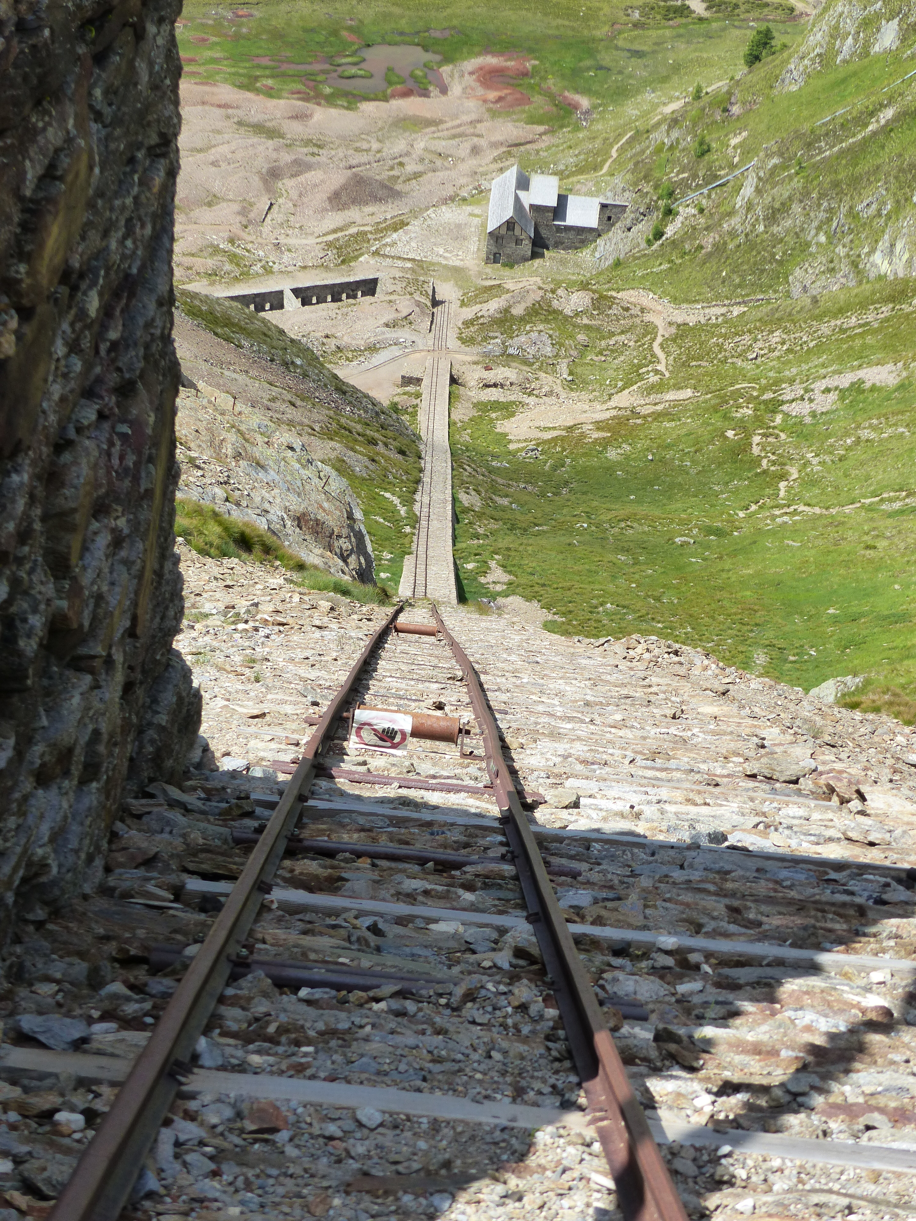 Überbleibsel und Rekonstruktionen in St. Martin (Schneeberg): Seemoos-Wassertonnenaufzug